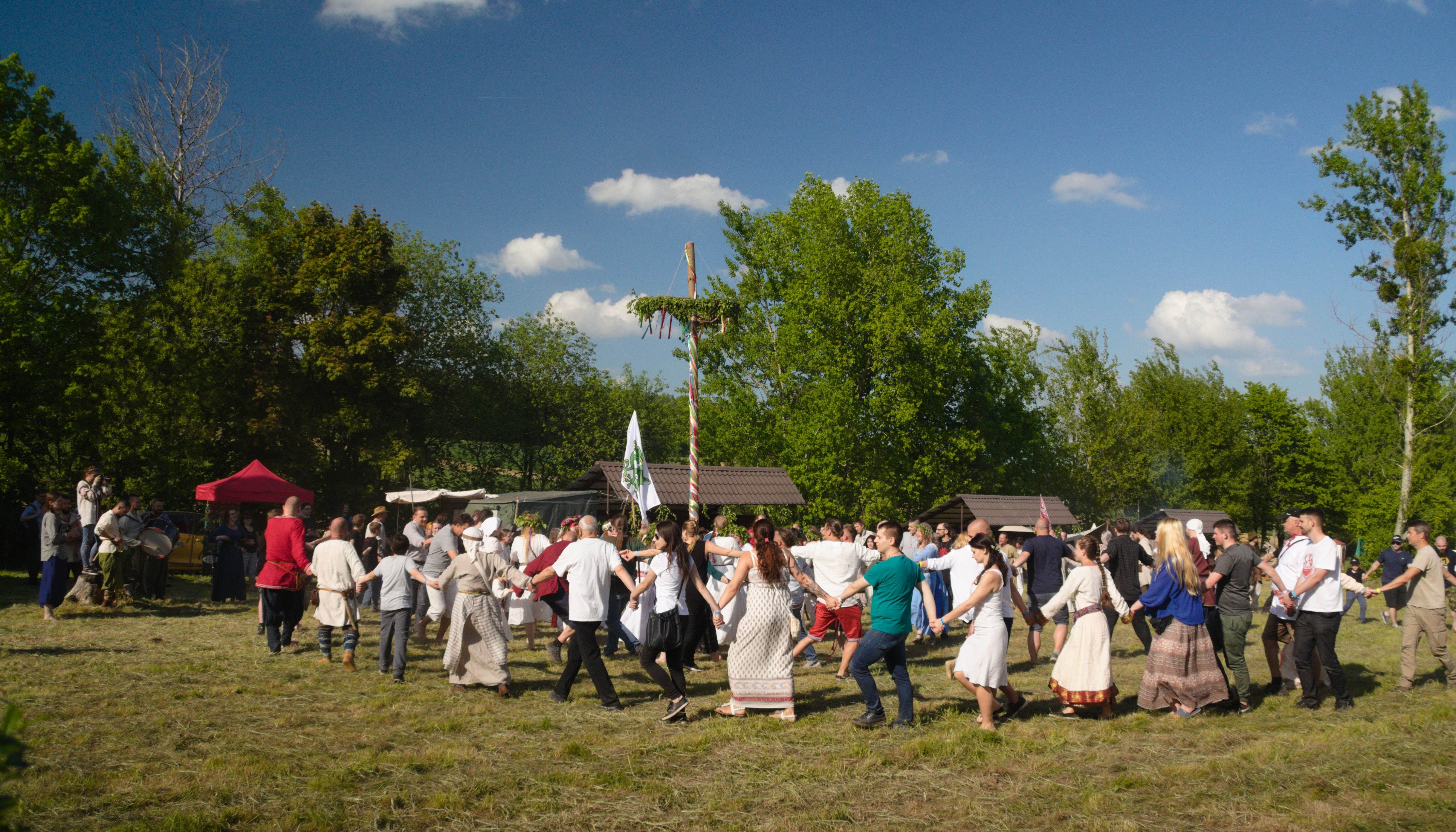 obchody rodzimowierczego święta Stado w Sulistrowicach, część obrzędu głównego, taniec wokół Słupa Majowego